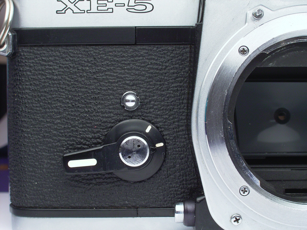 Mechanischer Selbstauslöser einer Spiegelreflexkamera (Minolta XE-5), eingestellt auf sechs Sekunden Vorlaufzeit. Die obere Markierung gilt für 10 Sekunden Vorlaufzeit.